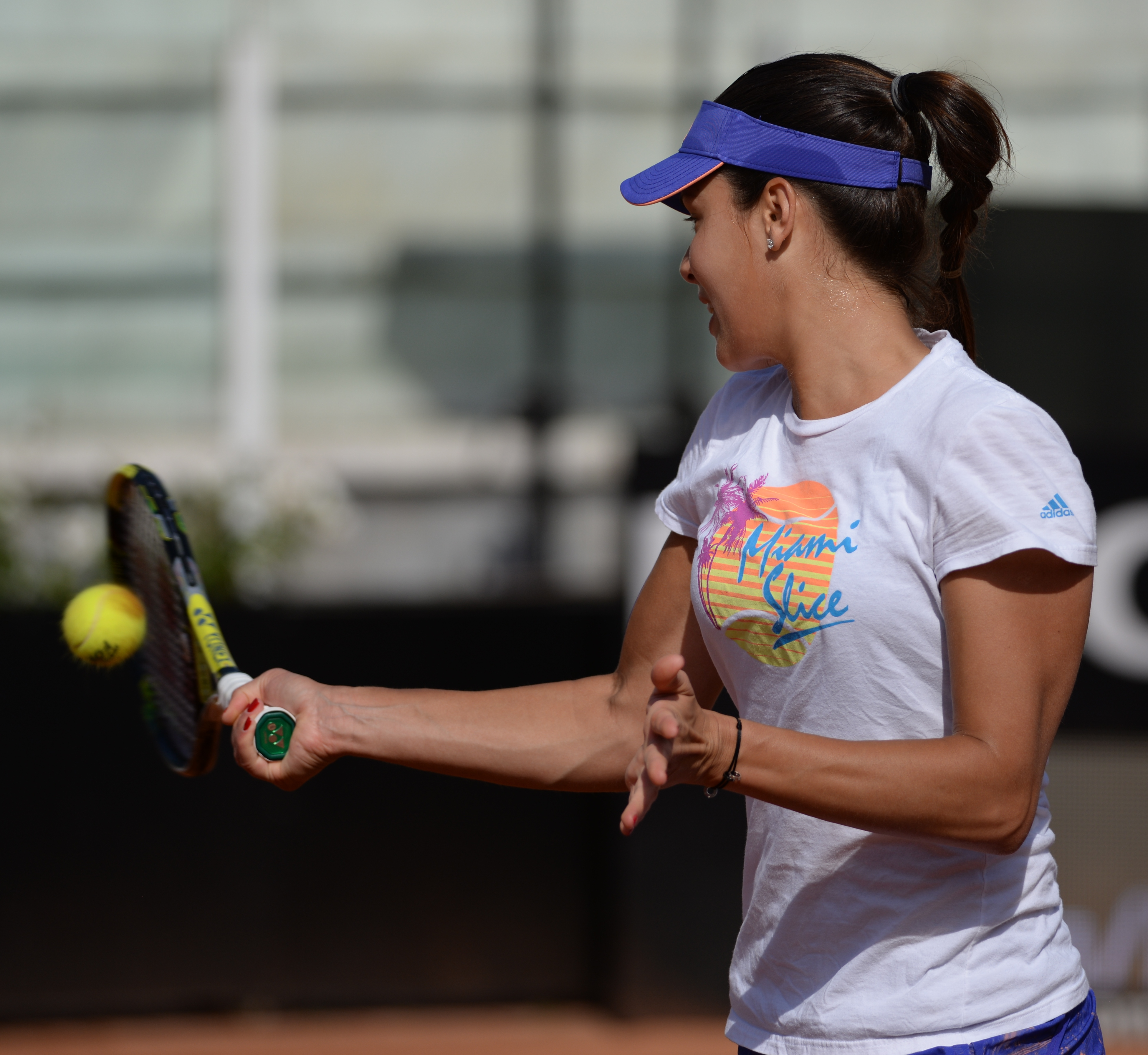 Ana Ivanovic